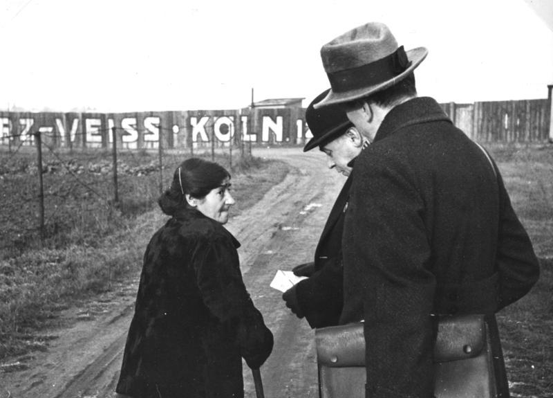 [Zigeunerlager]